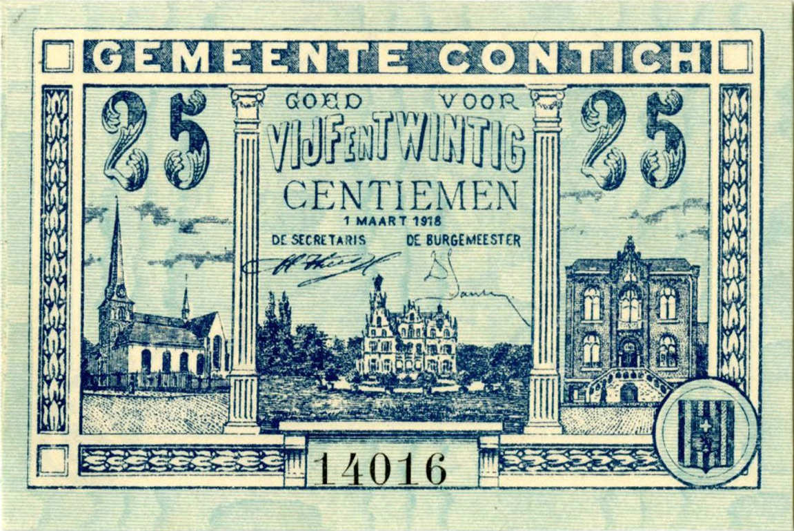 Noodgeld, Eerste Wereldoorlog - Kontich